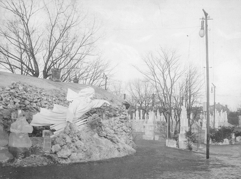 Tivoli, skøytebane, isskulpturer: draugen, gatebelysning.